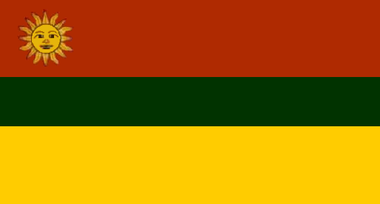 Bandera del municipio Morán, estado Lara, Venezuela